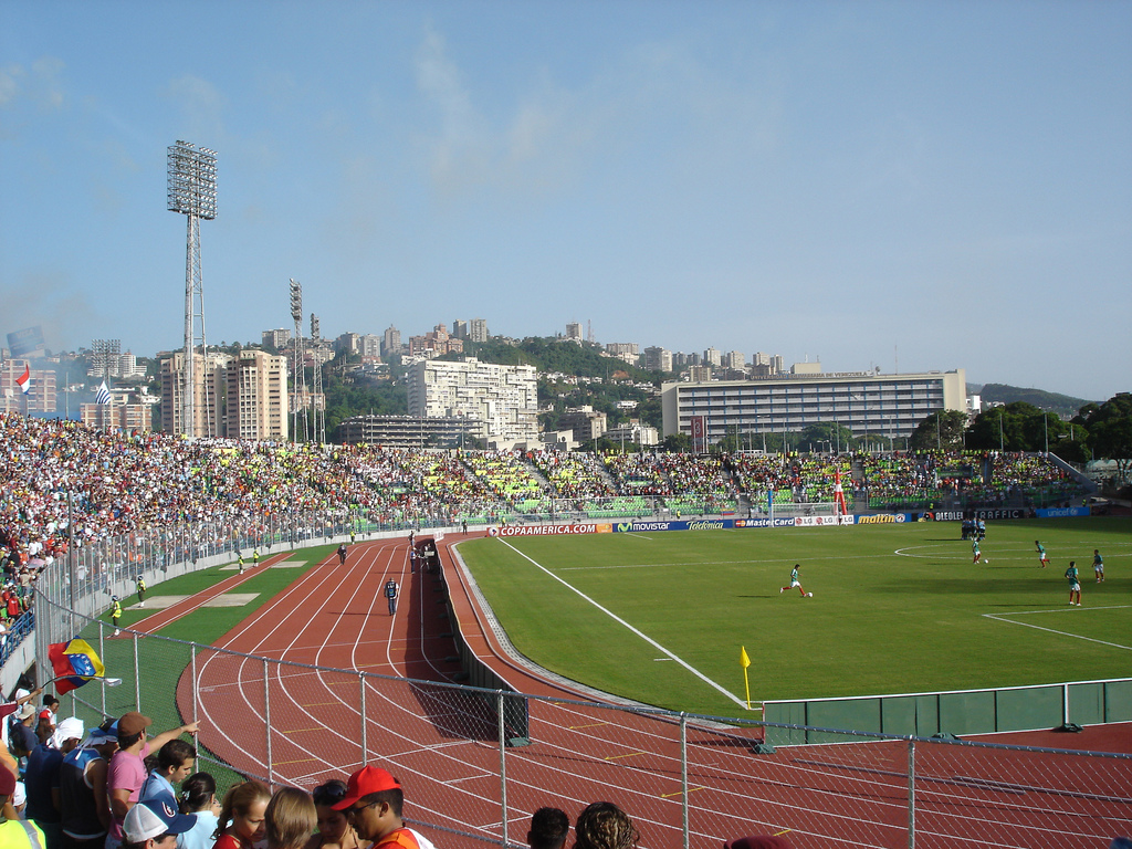 Partido por el 3er lugar Copa America - Mexico vs Uruguay